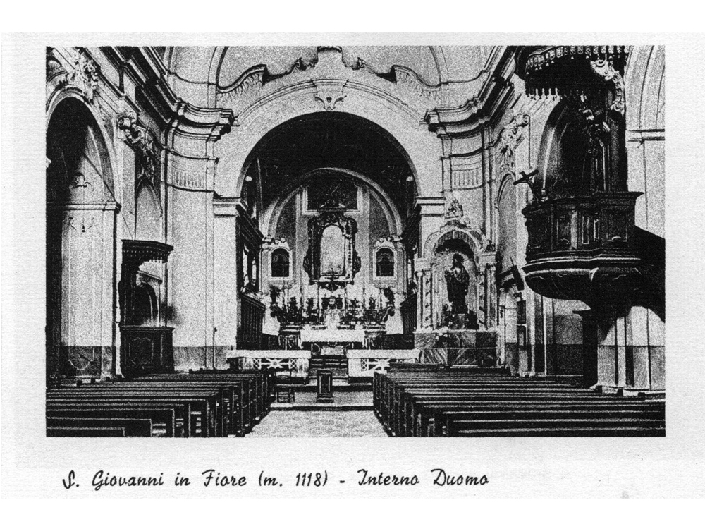 San Giovanni in Fiore - Chiesa Madre, cartolina ed. Marano